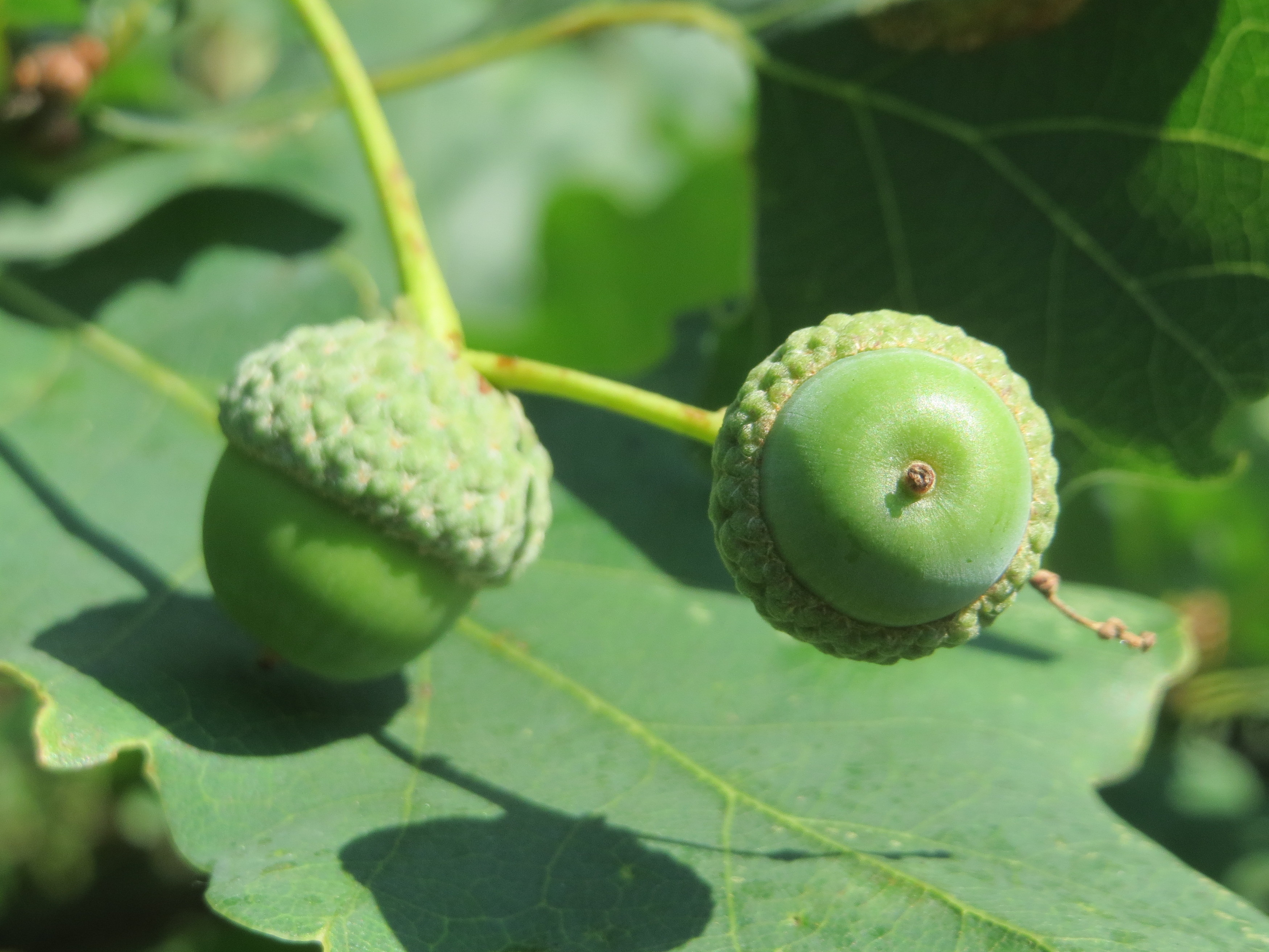 Stieleiche (Quercus robur) in Hockenheim